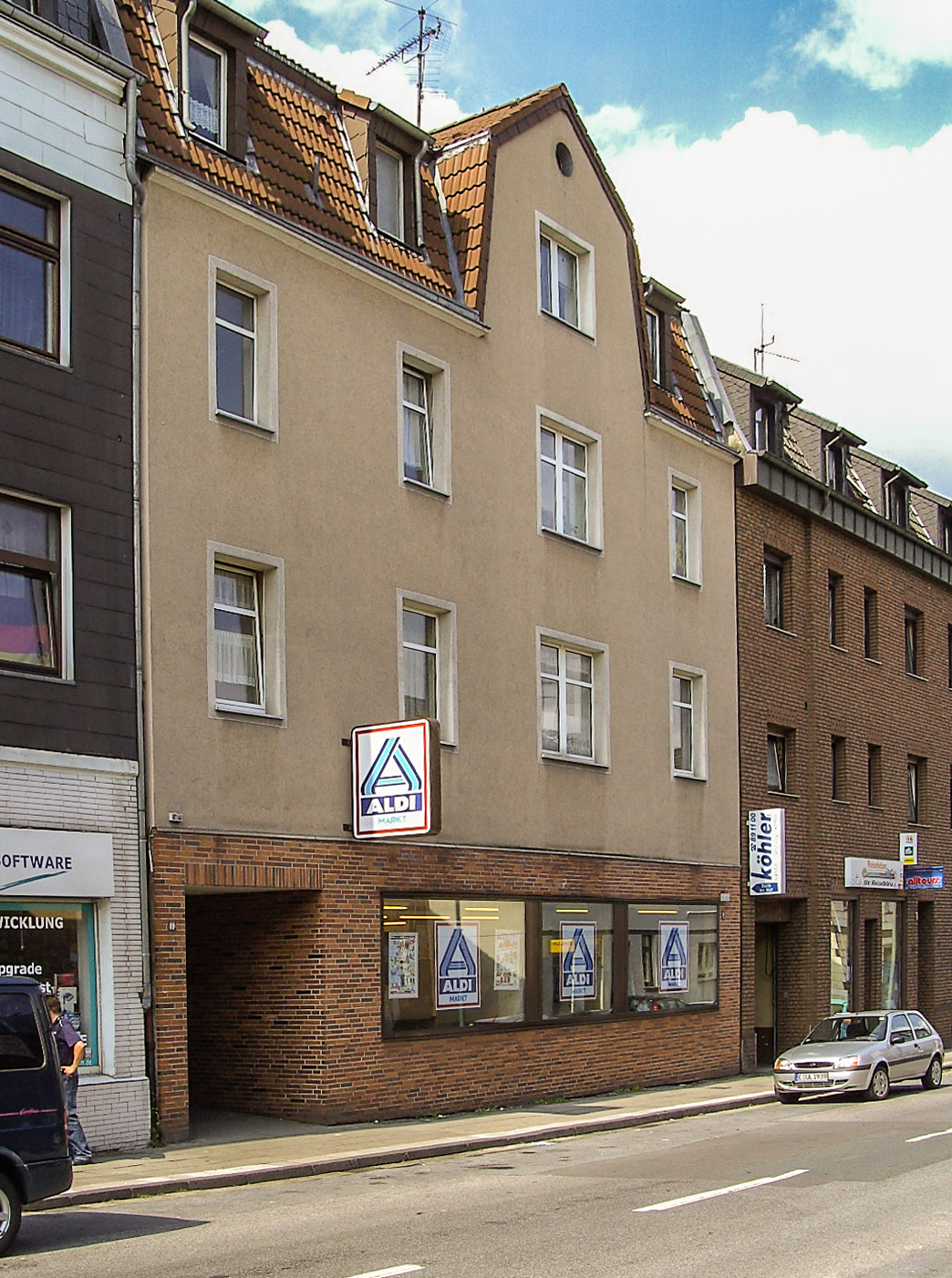 Erste Aldifiliale in Essen-Schonnebeck, Huestraße 89 Quelle: Eigene Aufnahme